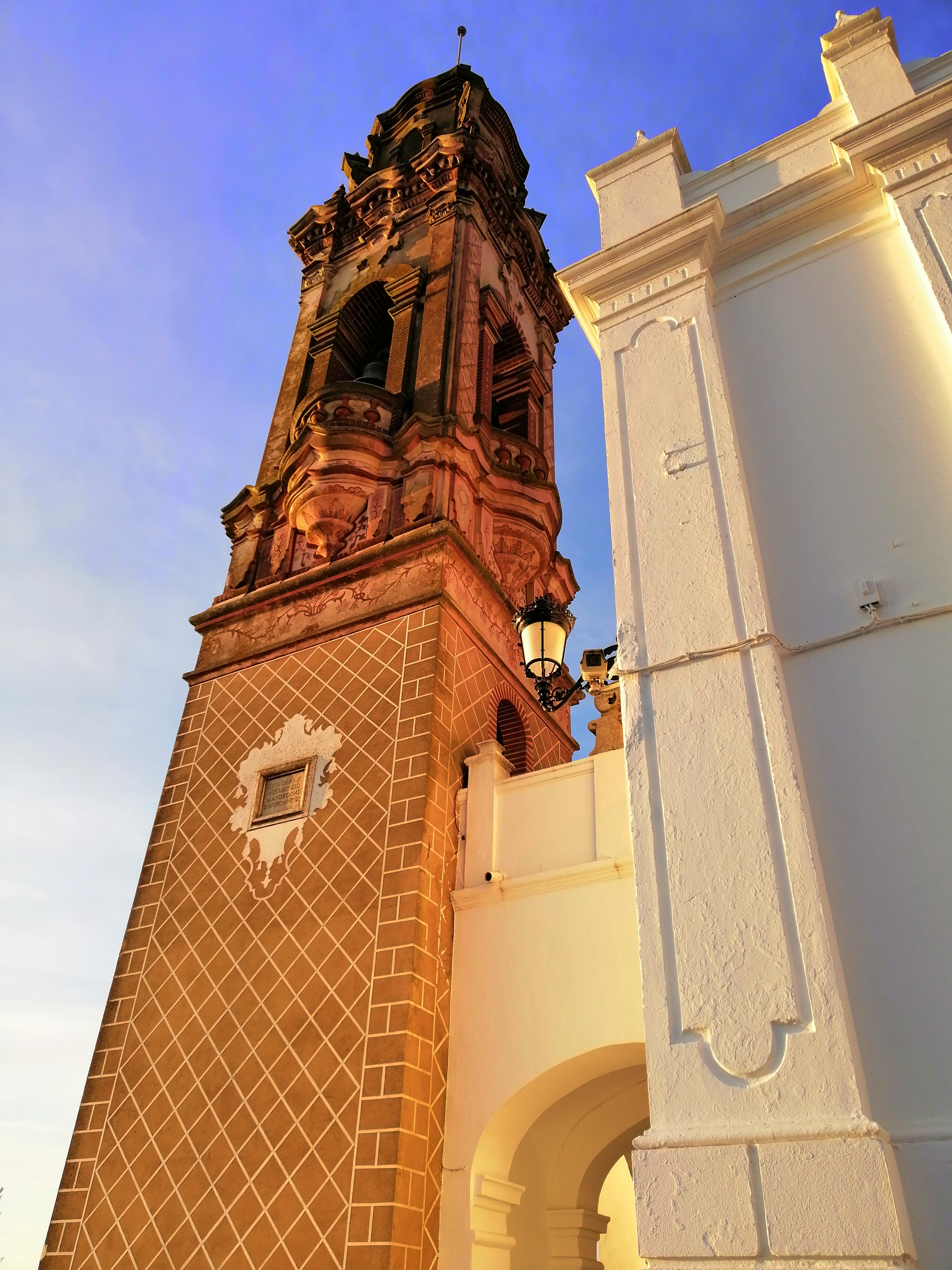 Imagen de la torre del Santuario de Nuestra Señora de Gracia, situado en Oliva de la Frontera (Badajoz).